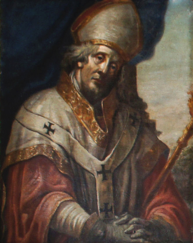 Porträtgemälde von Gottfried von Hexenagger, Fürstbischof von Freising, im Fürstengang zwischen Fürstbischöflicher Residenz und Freisinger Dom.